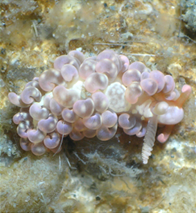 Spurilla neapolitana, France, Cap Ferret